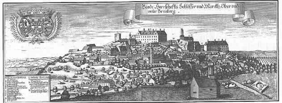 Ober- und Unterbrennberg Kupferstich von Michael Wening 1726